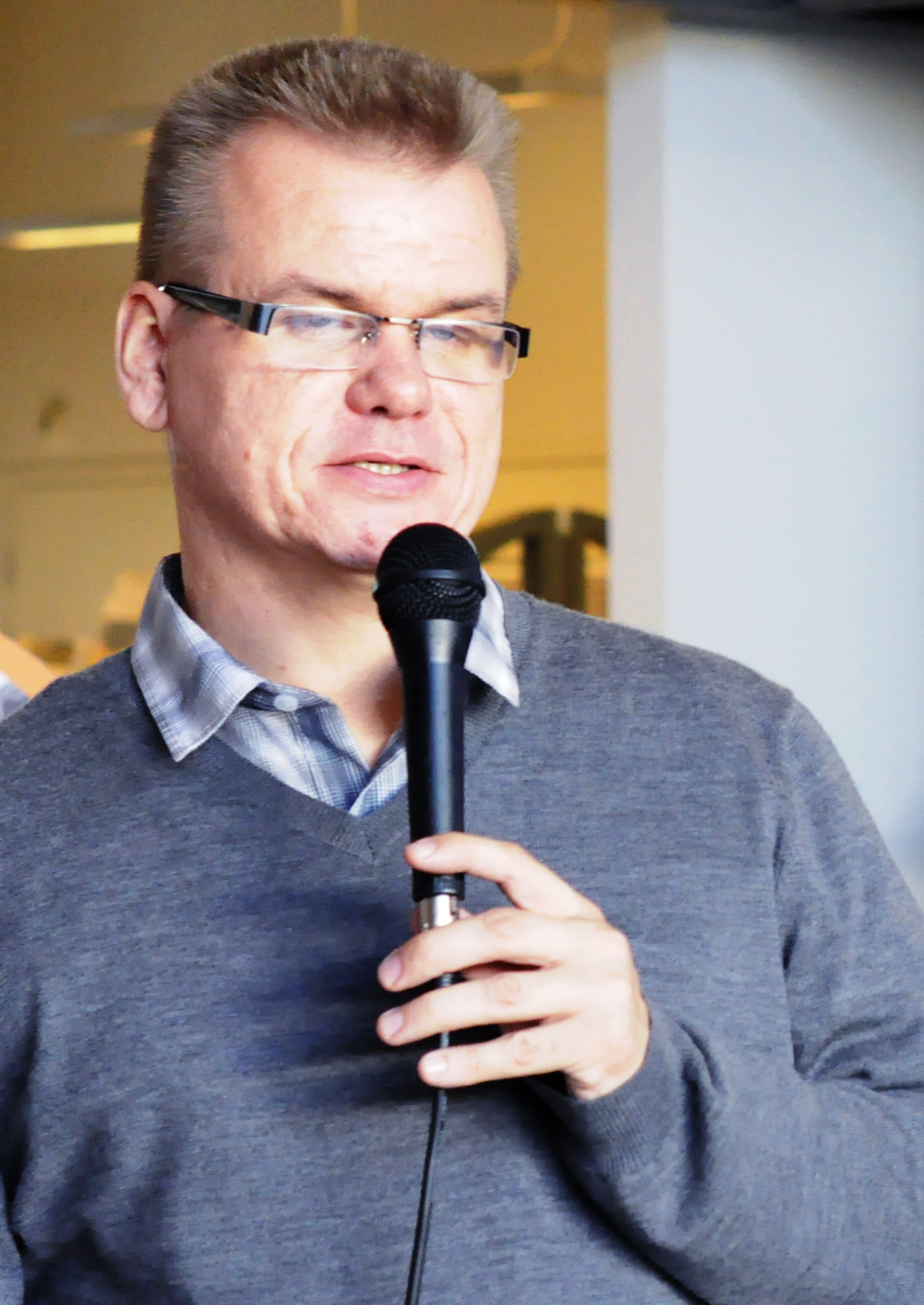 Yle, Kari Haakana Photos by Irving Hernandez